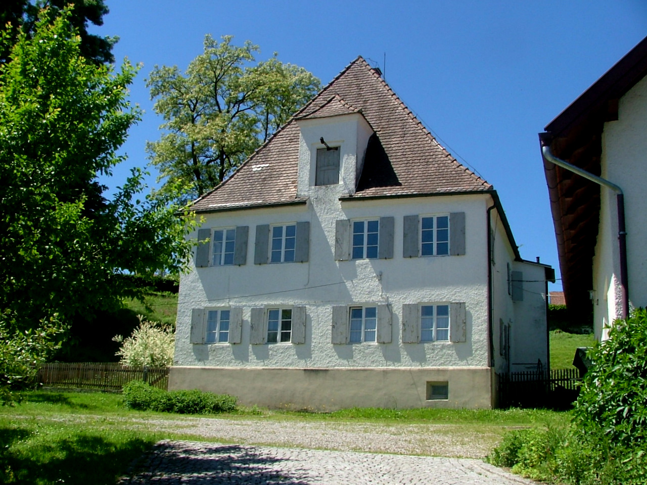 Pfarrhof